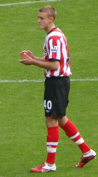 Louis Laing